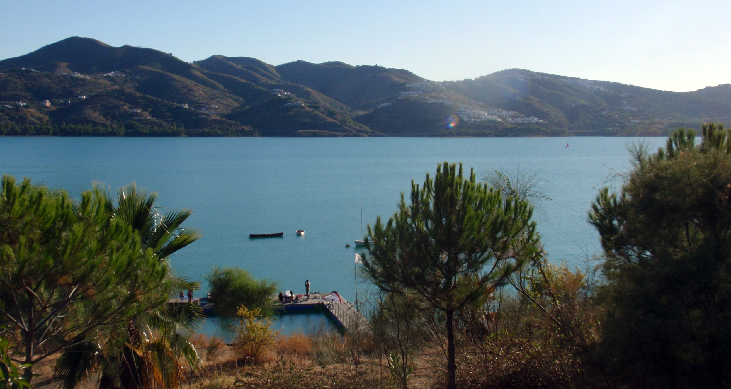 Embalse de la Viñuela